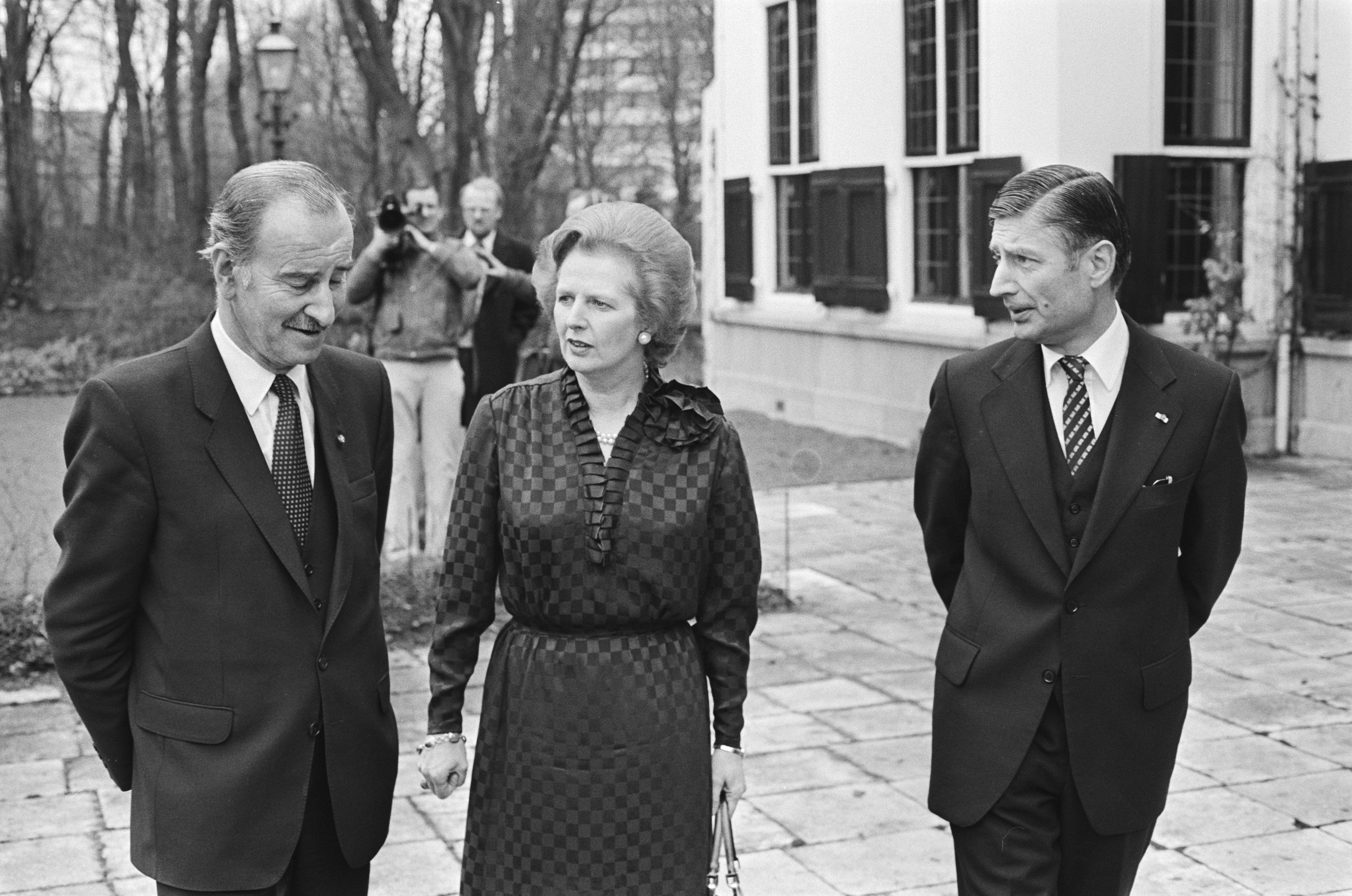 Collectie / Archief : Fotocollectie Anefo Reportage / Serie : [ onbekend ] Beschrijving : V.l.n.r. Minister Chris van der Klaauw, Premier Margareth Thatcher en Minister-president Dries van Agt op het terras van het Catshuis Datum : 6 februari 1981 Locatie : Den Haag, Zuid-Holland Trefwoorden : ambtswoningen, bezoeken, gebouwen, ministers, ministers-presidenten, tuinen Persoonsnaam : Agt, Dries van, Klaauw, C.A. van der, Thatcher, Margaret Fotograaf : Antonisse, Marcel / Anefo, [onbekend] Auteursrechthebbende : Nationaal Archief Materiaalsoort : Negatief (zwart/wit) Nummer archiefinventaris : bekijk toegang 2.24.01.05 Bestanddeelnummer : 931-3063